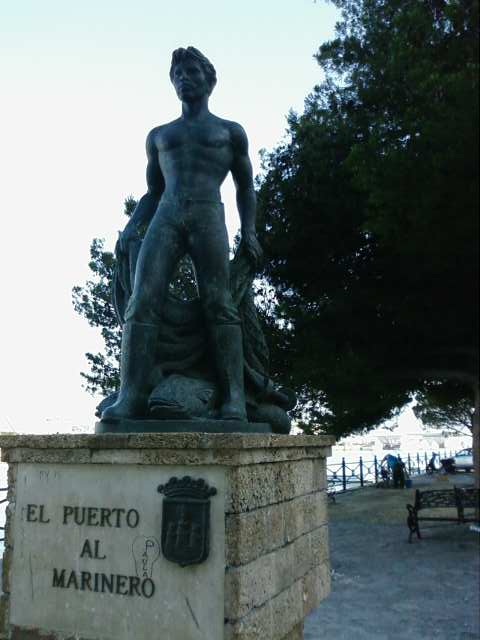 El Puerto al Marinero